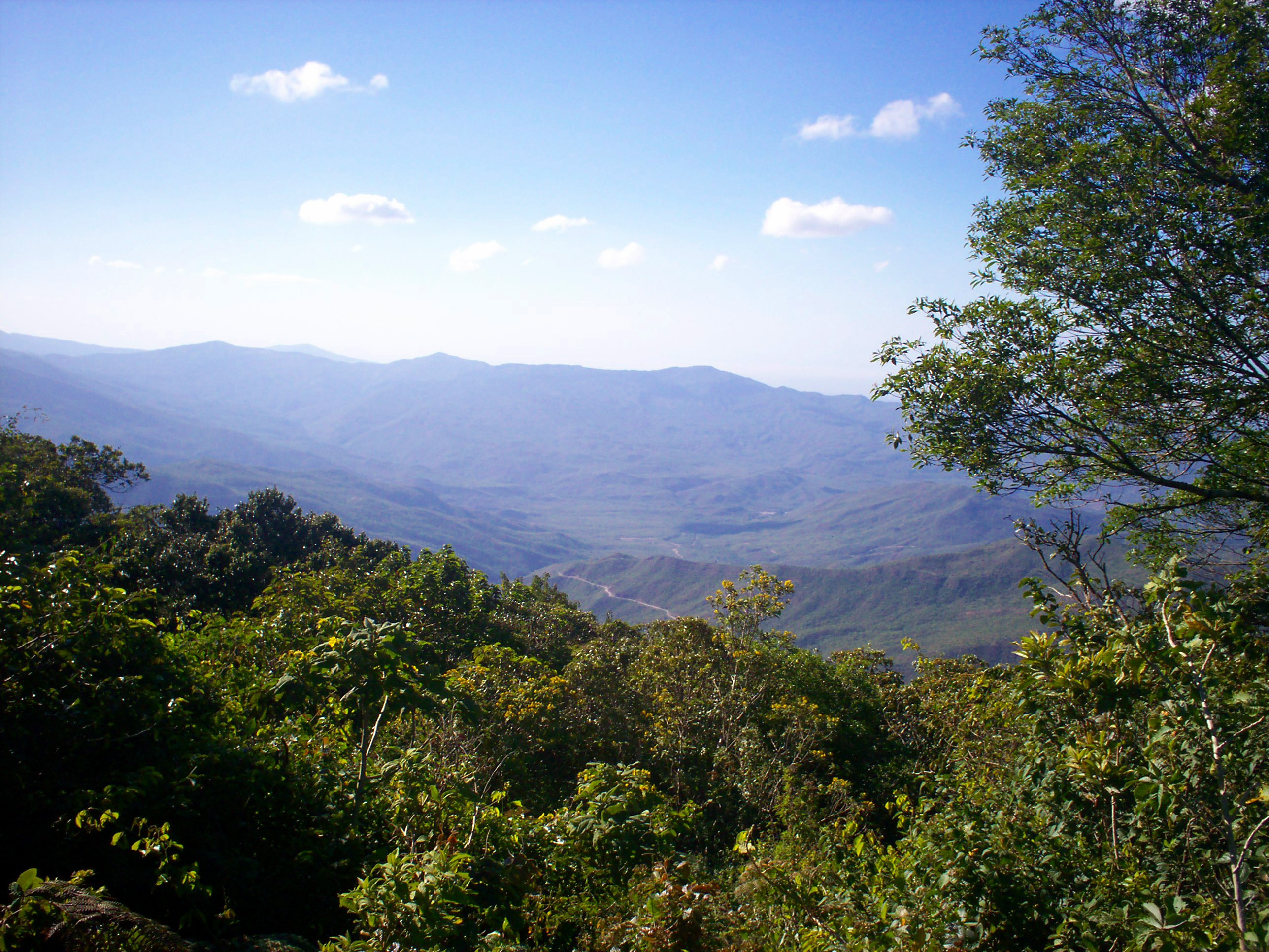 Cumbre del Cerro Galicia, Curimagua,Sierra de San Luis, Estado Falcón